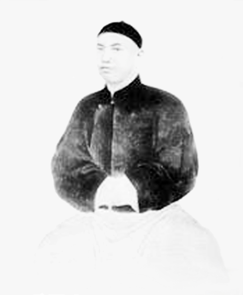 韩绍徽，清朝官员